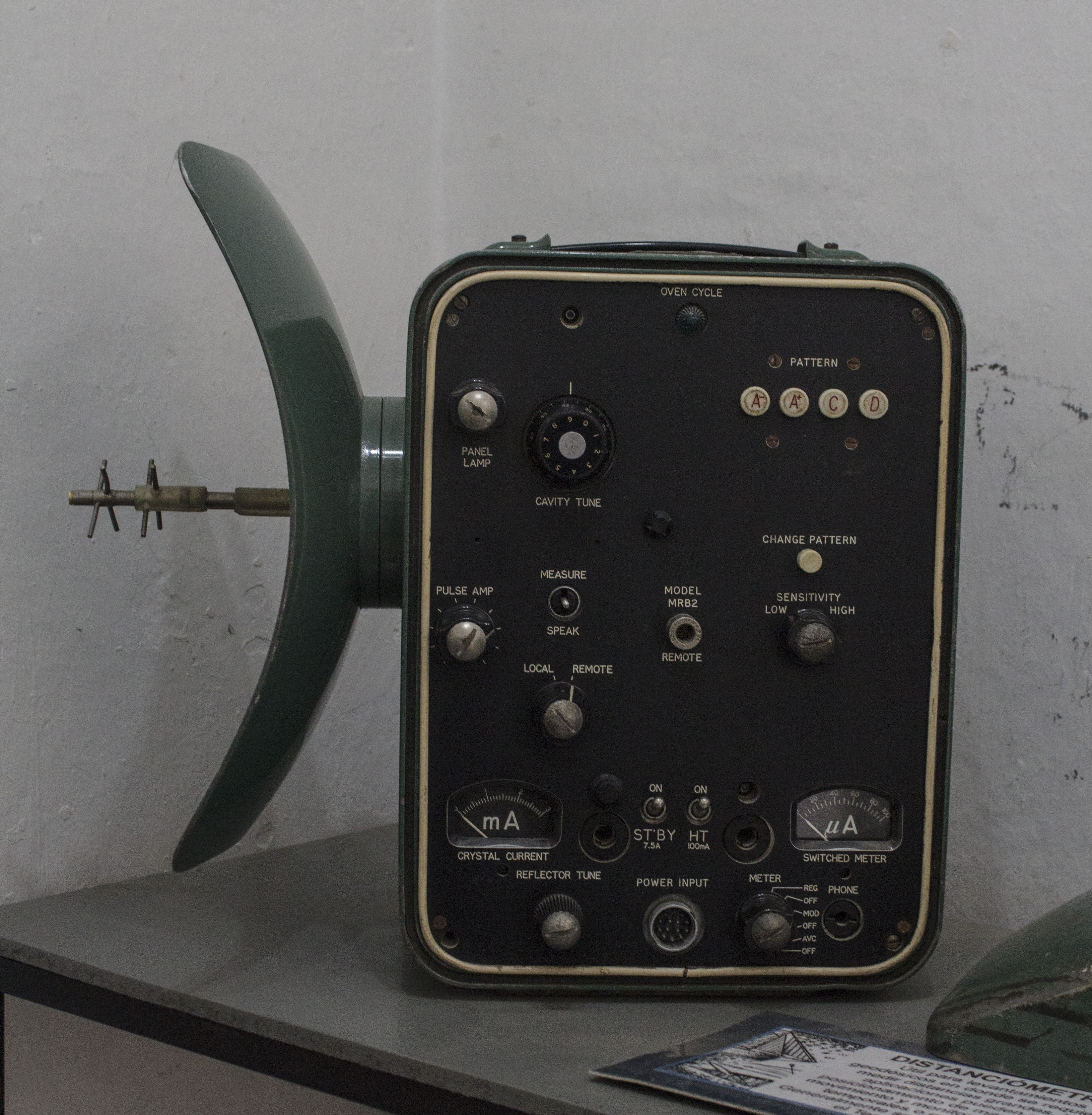 Museo marítimo y prisión del fin del mundo, Ushuaia, Tierra del Fuego, Argentina